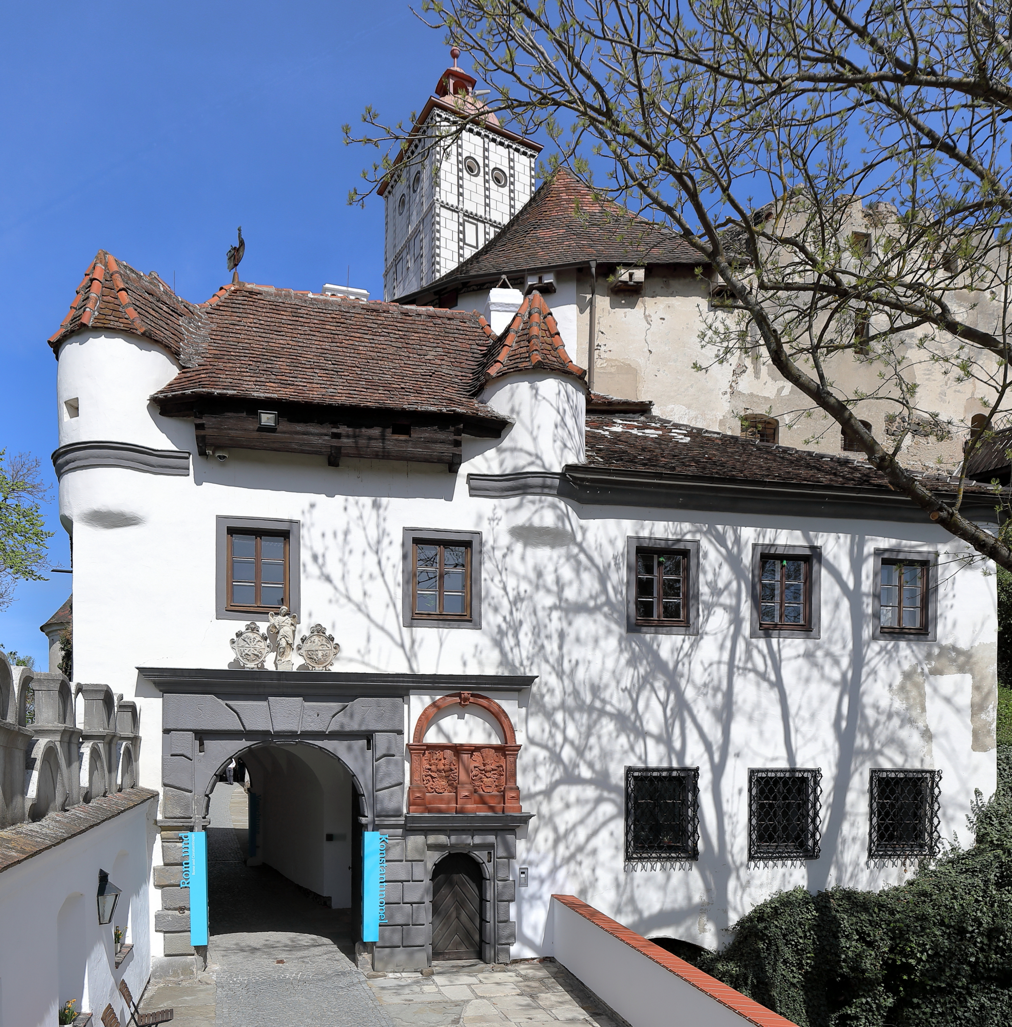 Das sogenannte „Försterstöckl“ bzw. die Tordurchfahrt nach dem Burggraben des Schlosses Schallaburg in Schallaburg, ein Ortsteil der niederösterreichischen Gemeinde Schollach. Unter Christoph II. von Losenstein erfolgte ab 1540 der Umbau der in der 1. Hälfte des 12. Jahrhunderts errichten Burg zu einem Renaissanceschloss. Dabei wurde unter anderem der nördliche Teil der Ringmauer geschliffen und 3 Renaissance-Trakte mit zwei Türmen um einen großen Hof errichtet und auch die Tordurchfahrten wurden neu errichtet bzw. neu gestaltet.